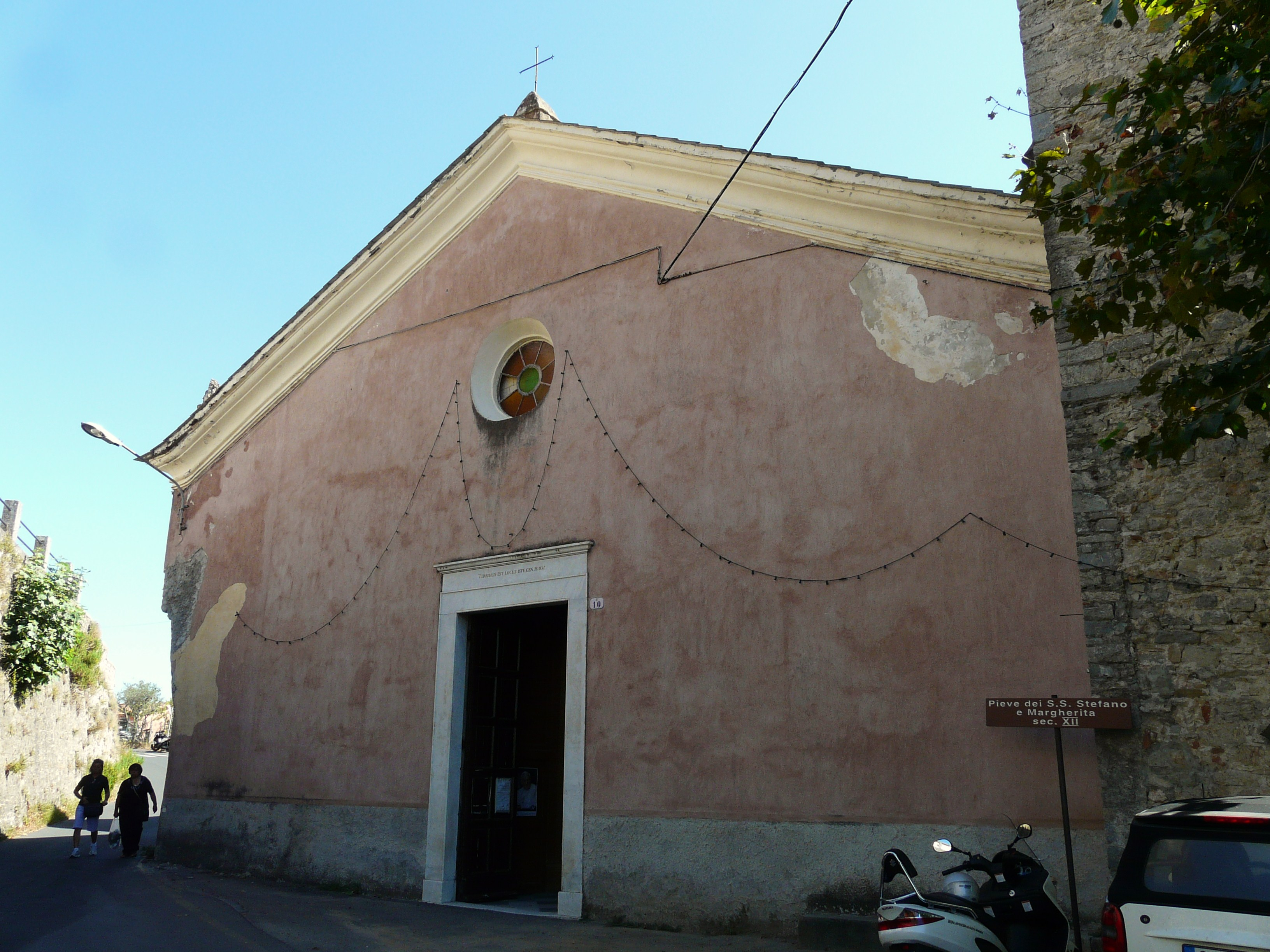 Facciata della pieve dei Santi Stefano e Margherita di Baccano, Arcola, Liguria, Italia